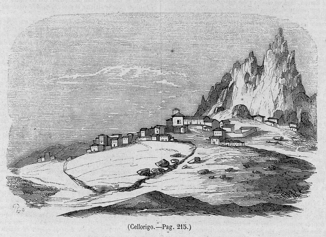 Cellorigo.